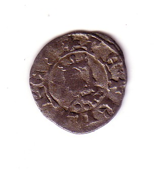 Diner de Barcelona, de Pere III (anvers)